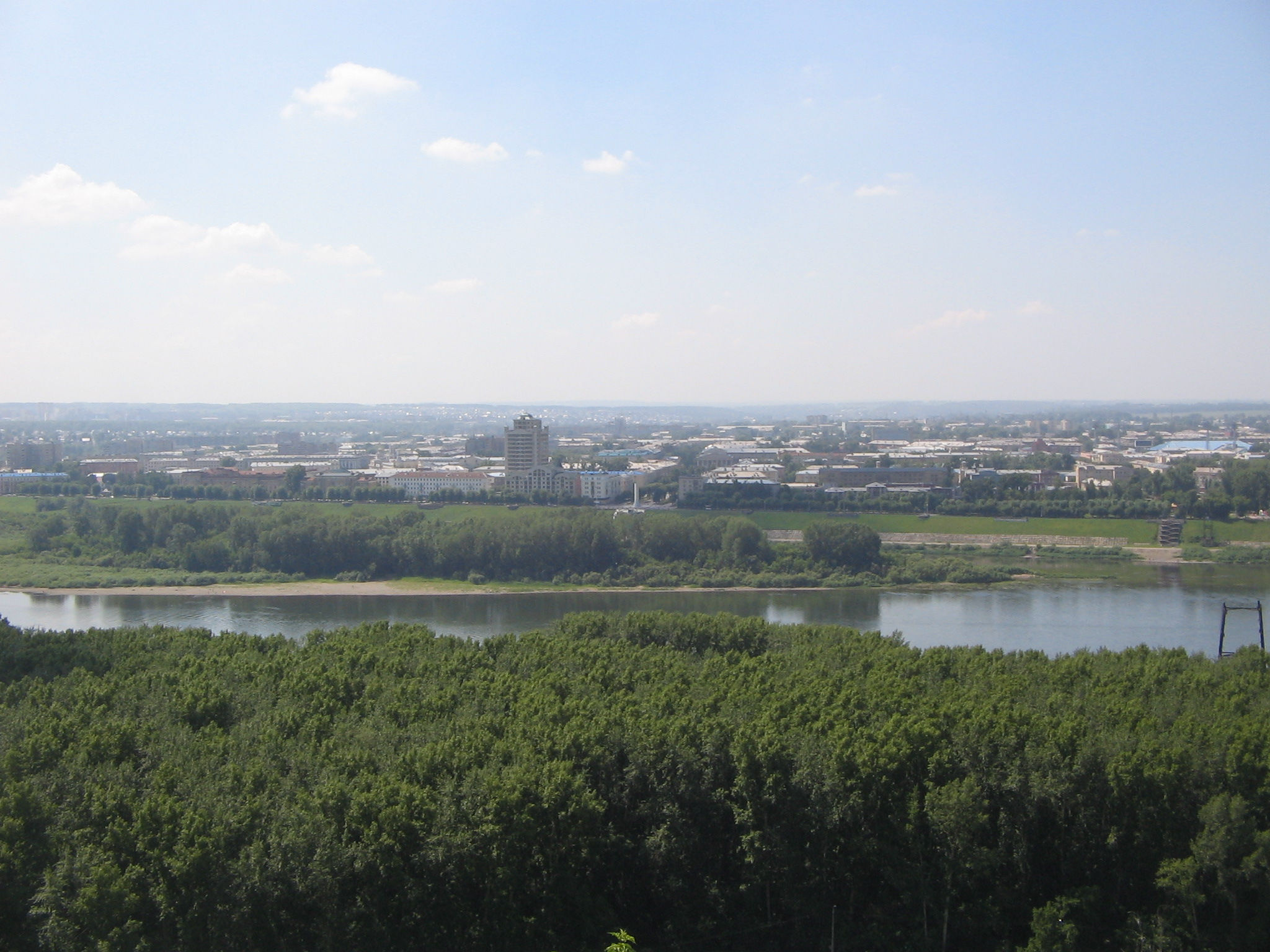 Кемерово. Вид иэ Соснового Бора.